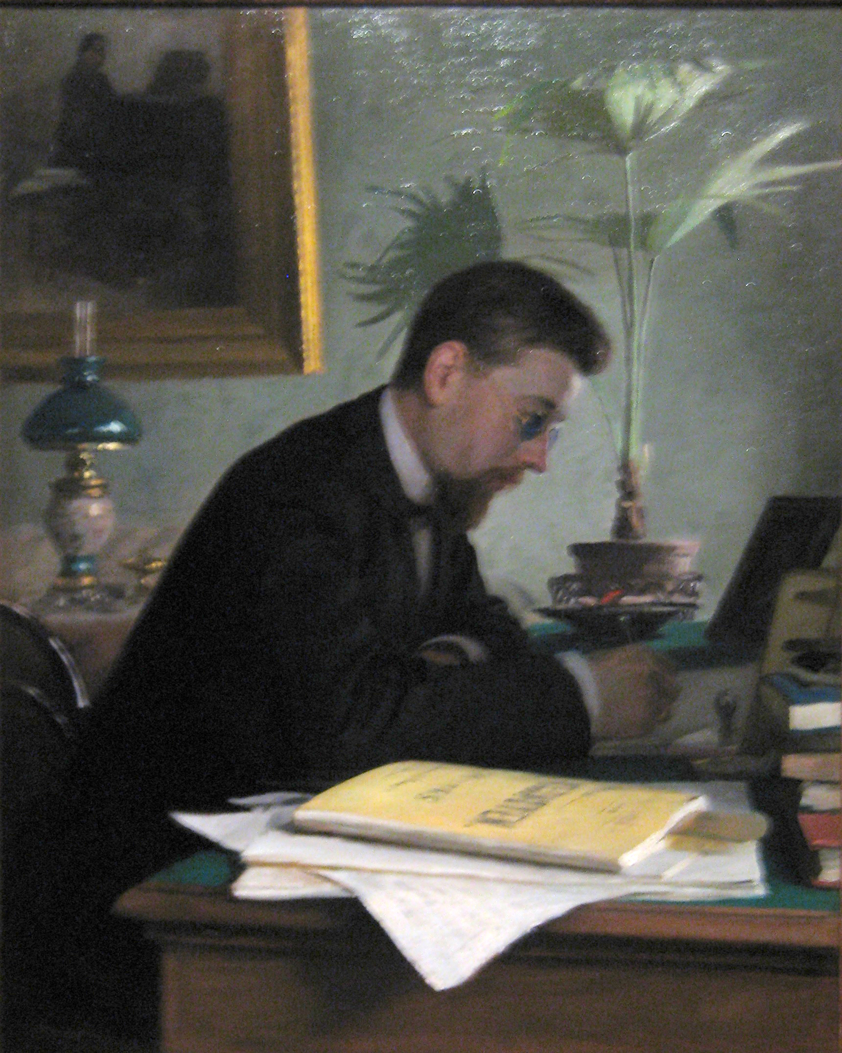 Выставка "Национальная портретная галерея", ГИМ, 2012